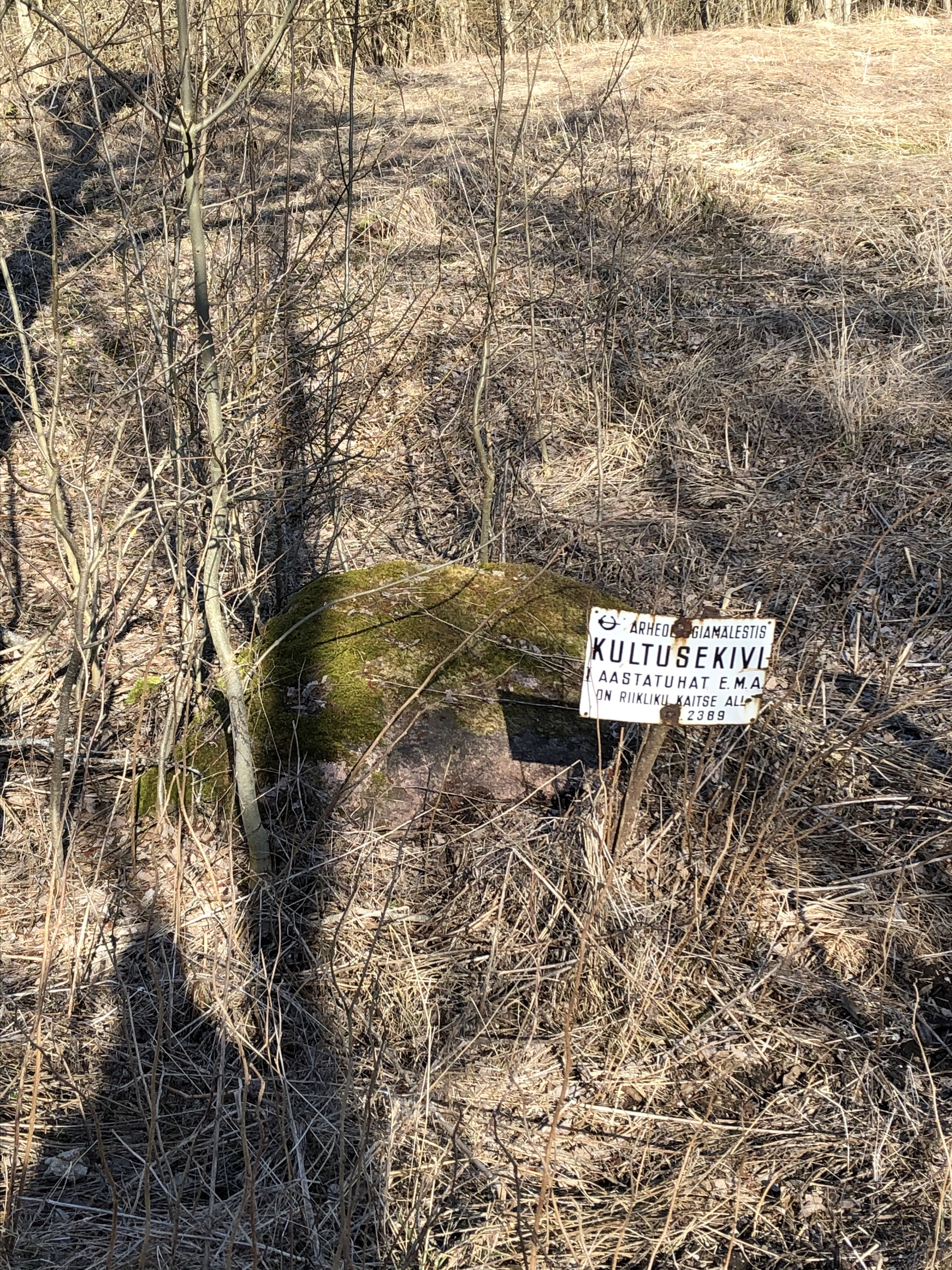 Kultusekivi